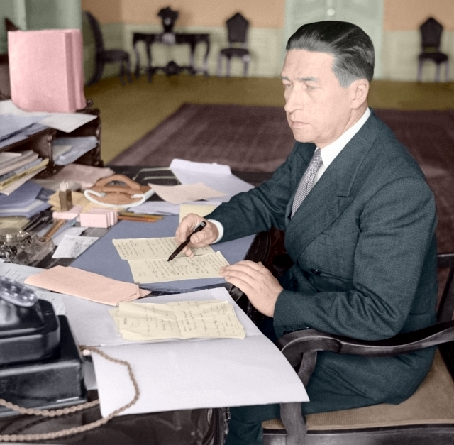 Prokop Drtina ve své kanceláři, září 1945 (kolorovaná fotografie)